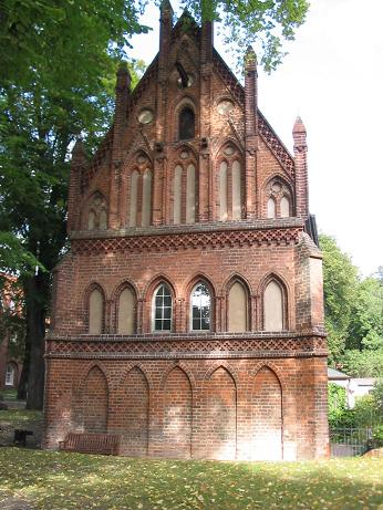 Kloster Lehnin, Brandenburg, "Königshaus" Zu Klosterzeiten wahrscheinlich das Hospital, 14. Jahrhundert